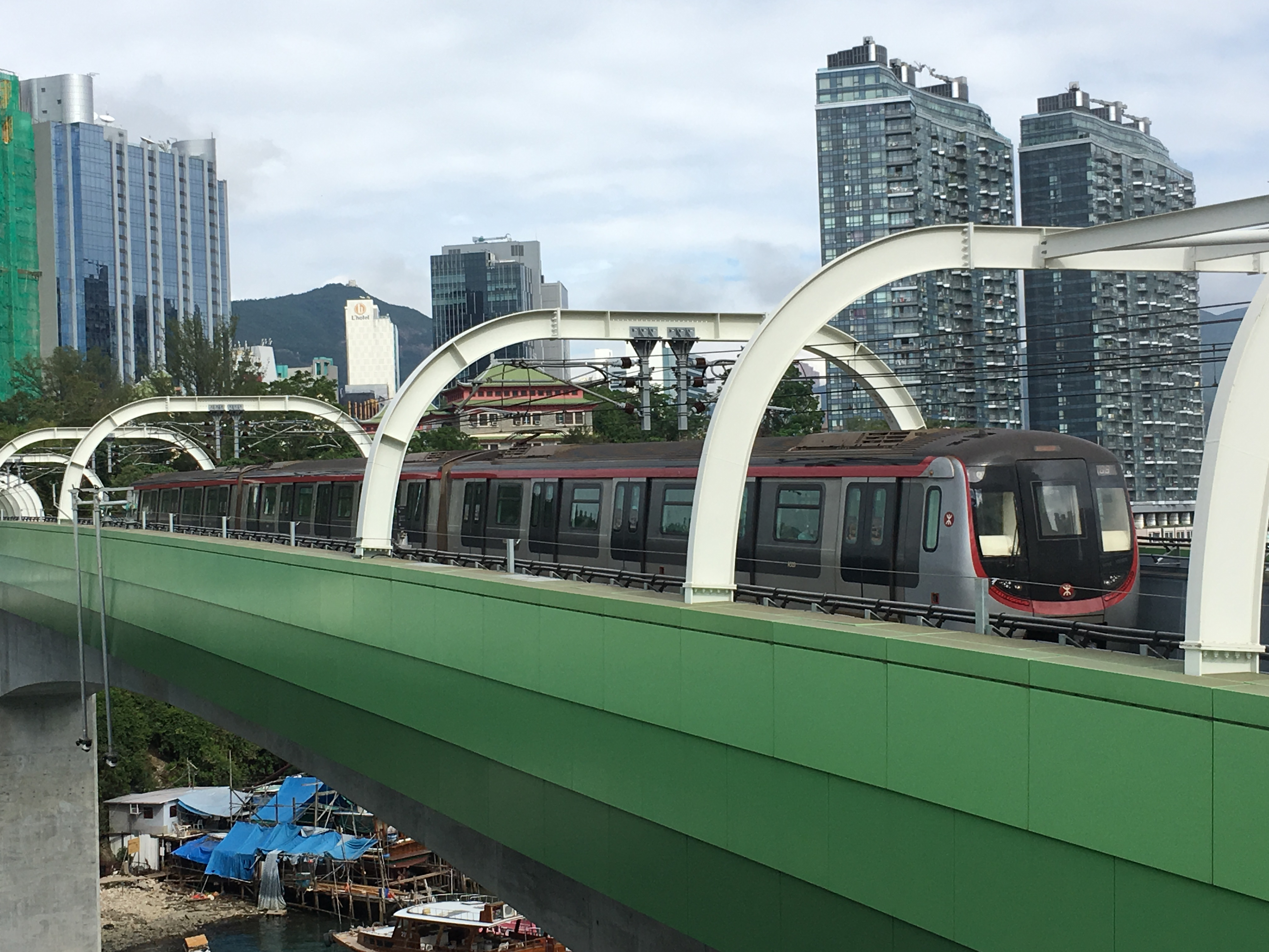 This photo is taken in Ape Lei Chau.